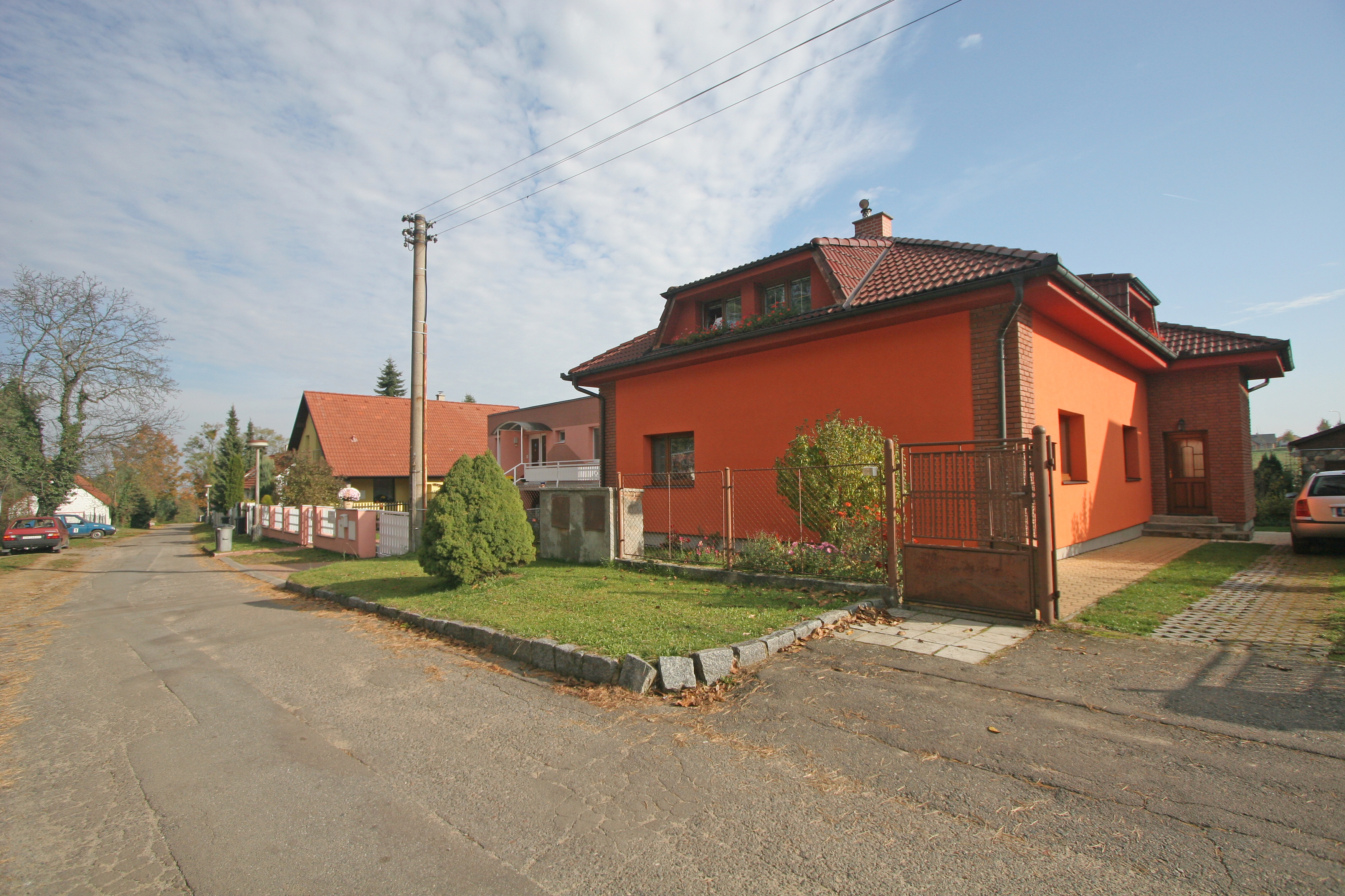 Konopáč